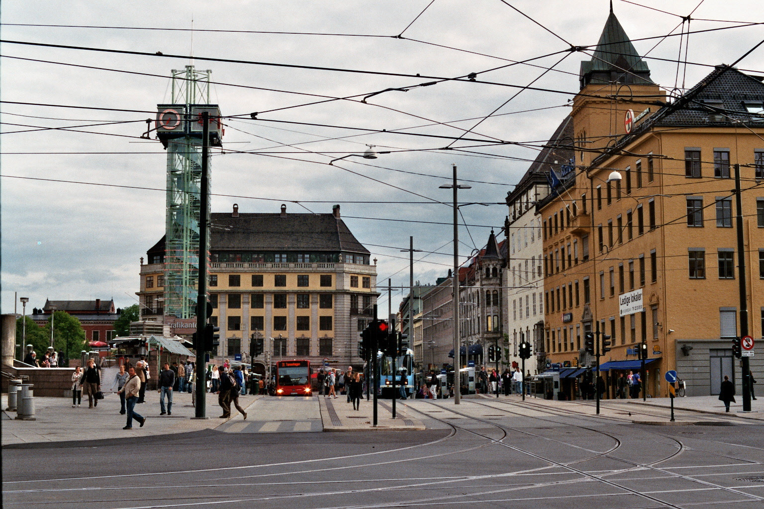 Jernbanetorget i Oslo.